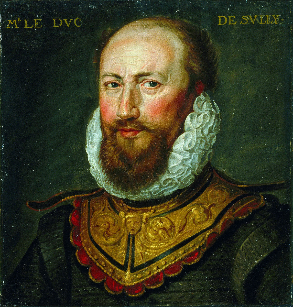 Maximilien de Béthune (1559-1641), duc de Sully. Peinture, école française du XVIe s., musée des beaux-arts de Blois.